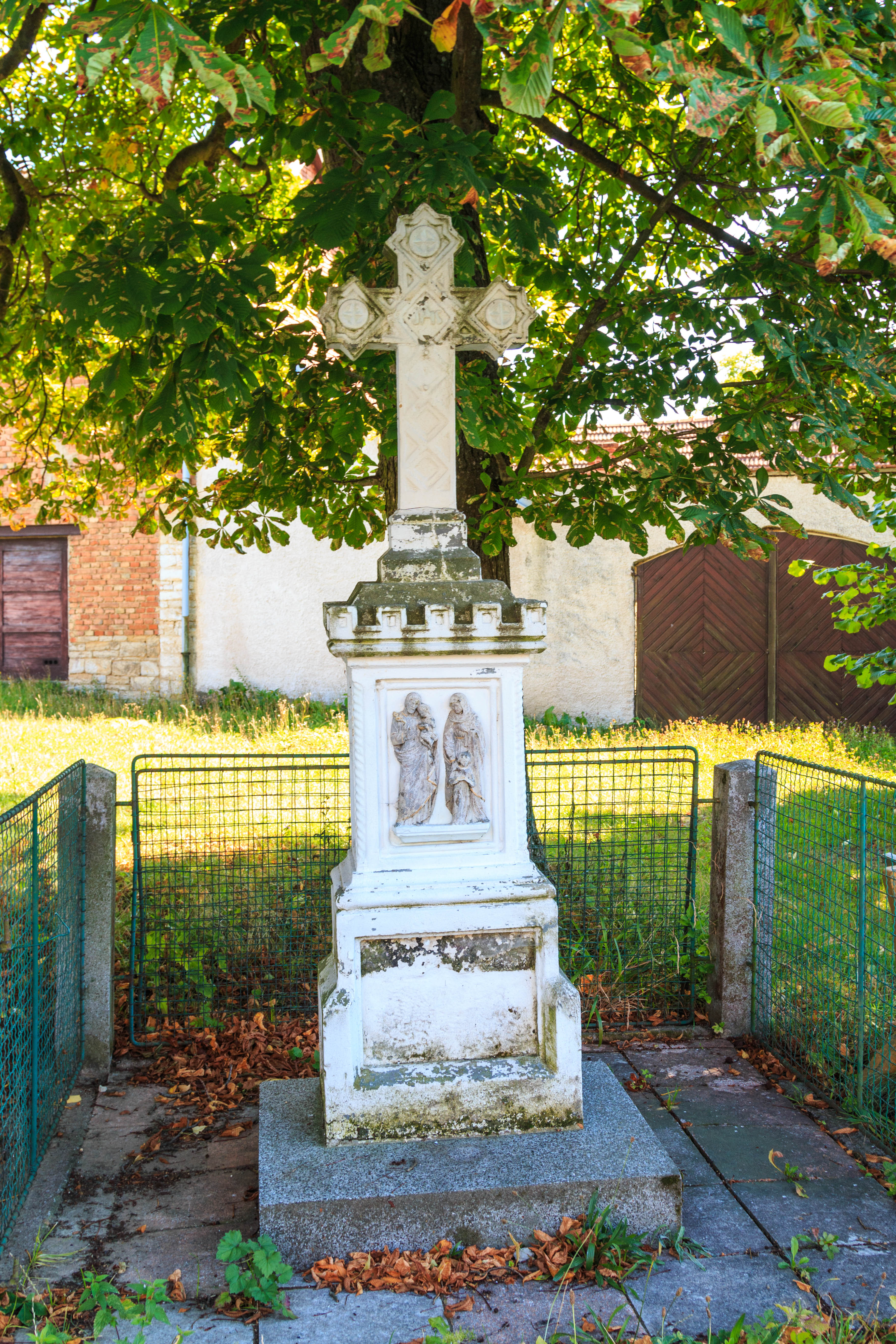 Střítěž u Hluboké křížek